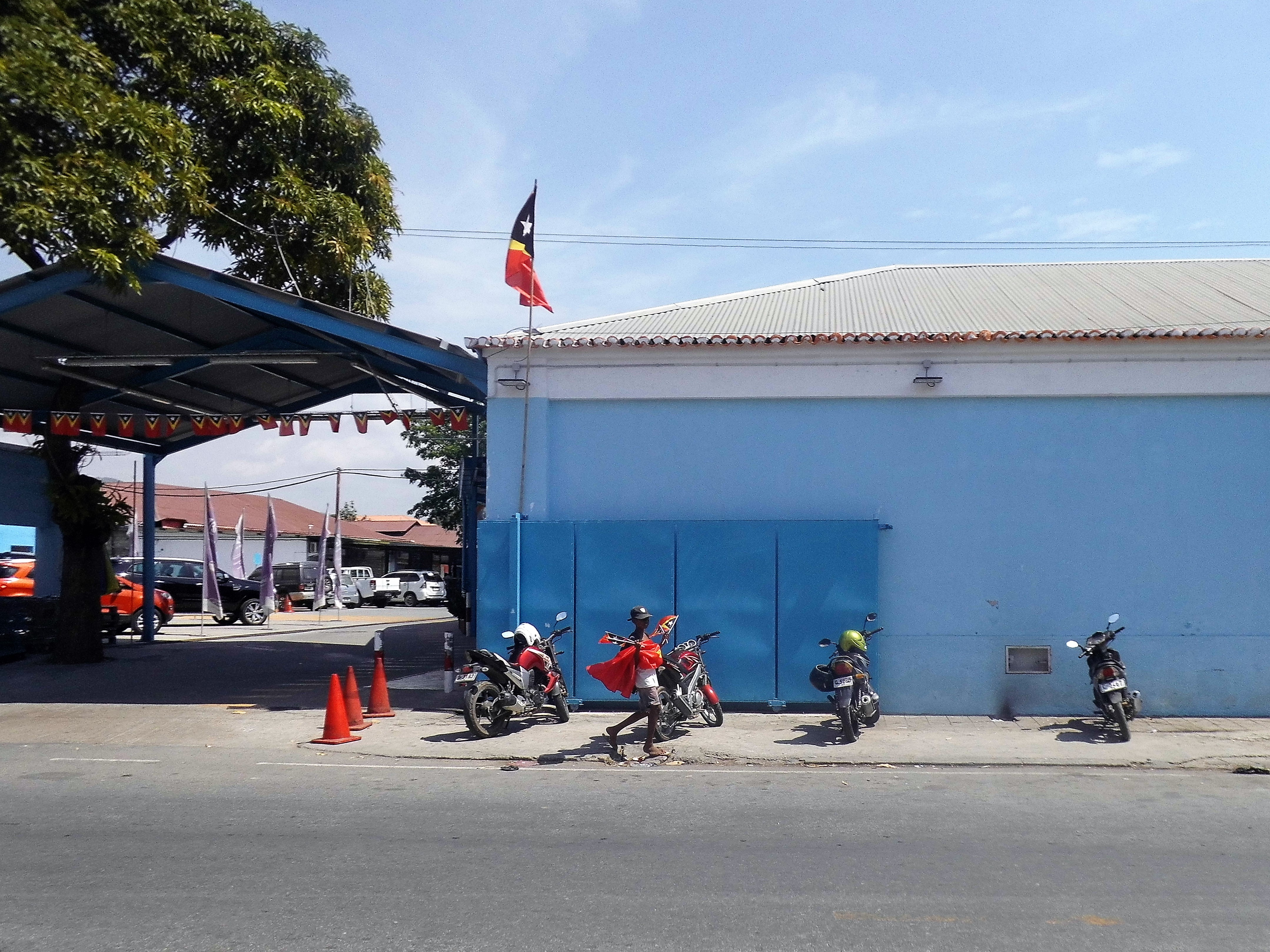 Rua de Mocambique